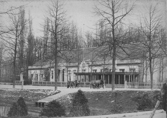 Gezicht op de voorgevel van de Sociëteit Tivoli te Utrecht, vanaf de brug naar het Park Tivoli.